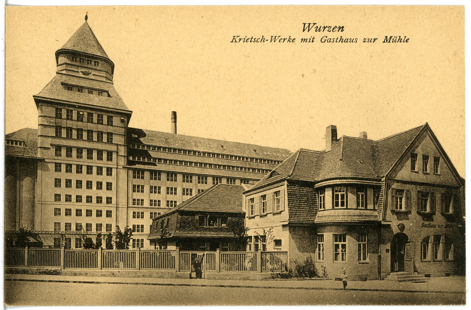 Wurzen; Krietsch-Werk und Gasthaus zur Mühle This postcard is from publisher Brück & Sohn in Meißen ( postcard has a unique number 21522 and is available in a higher resolution at the publisher. This images was uploaded in a cooperation project between Wikipedians and the publisher.